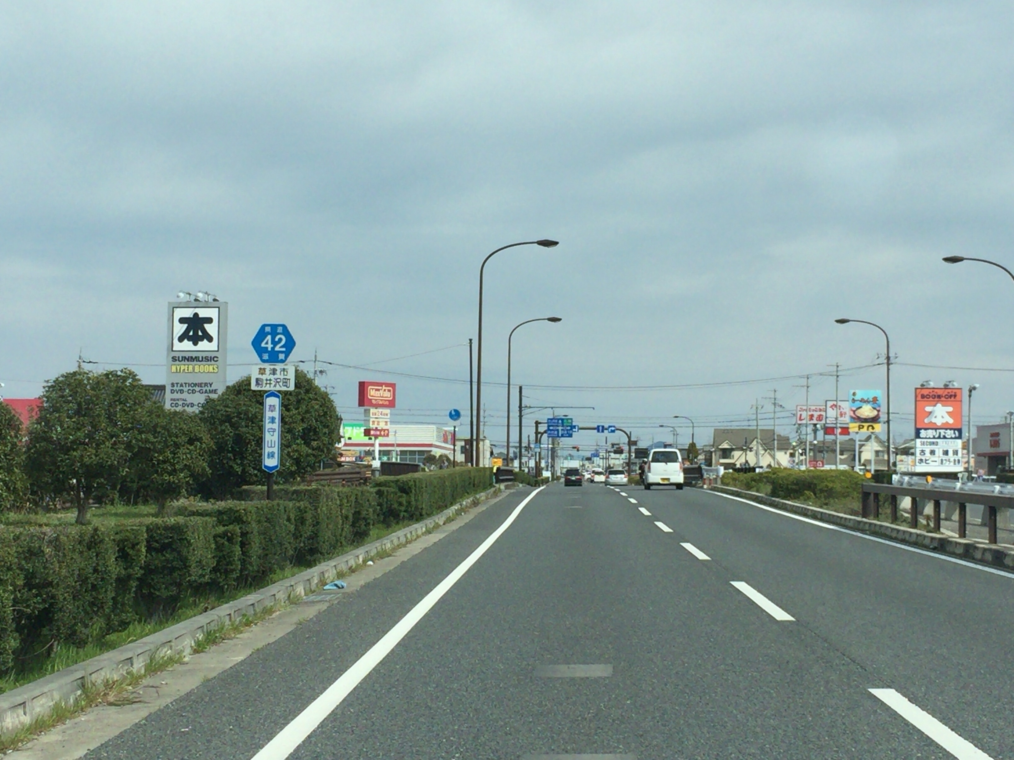 滋賀県道42号草津守山線で、草津市駒井沢町（こまいざわちょう） ↑駒井沢東交点（県道31号線と接続） 凸（カメラ）